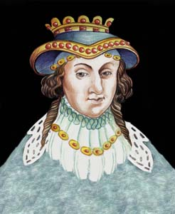 Summary Rainha de Portugal Licensing 20:58, 16 Março 2006 L Gonçalves 246x300 (30126 bytes) (Rainha de Portugal)